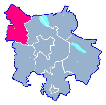 Locator maps for communes in województwo zachodniopomorskie : Bielice gm.png (podział na gminy)